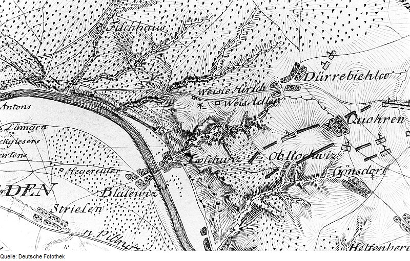 Original image description from the Deutsche Fotothek Dresden-Weißer Hirsch. Ausschnitt aus: Situationskarten von den Kriegsschauplätzen des 7jährigen Krieges, Bl. 4 Dresden-Schandau, 1805 (Sign.: VIII 57)